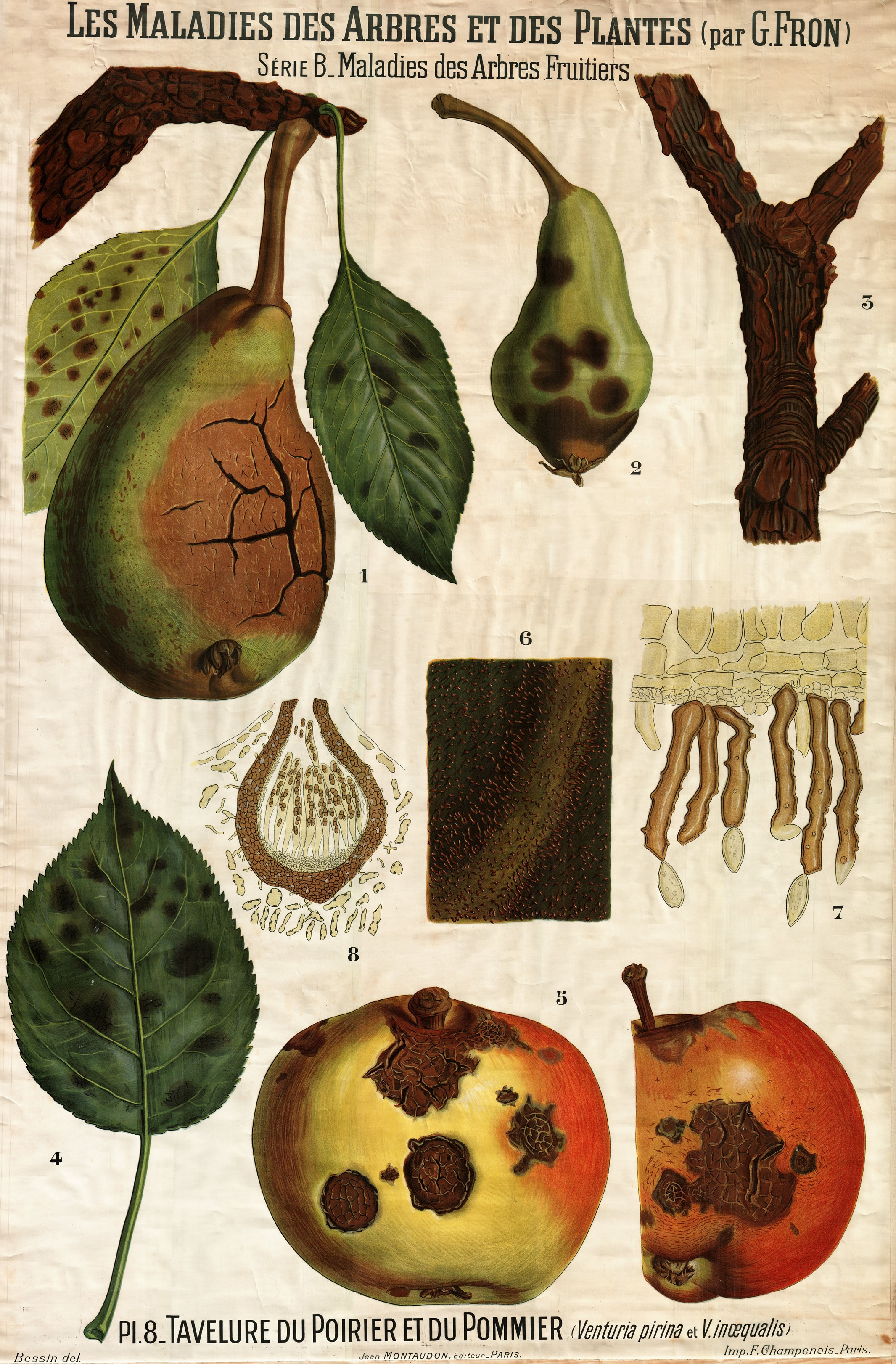 Les maladies des arbres et des plantes. Bibliothèque Numérique de l'Université d'Artois. Retrieved on 25 March 2016.